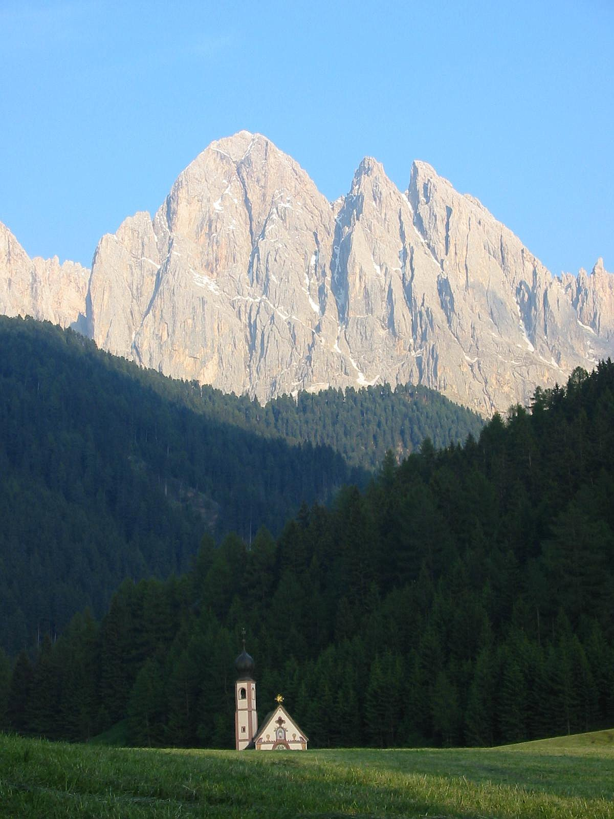 Sass Rigais (linker Berg) mit Kirche St. Johann vom Villnösstal aus gesehen. Aufnahmedatum: 13. Juni 2002 Lizenz: GNU FDL Quelle: Eigene Aufnahme